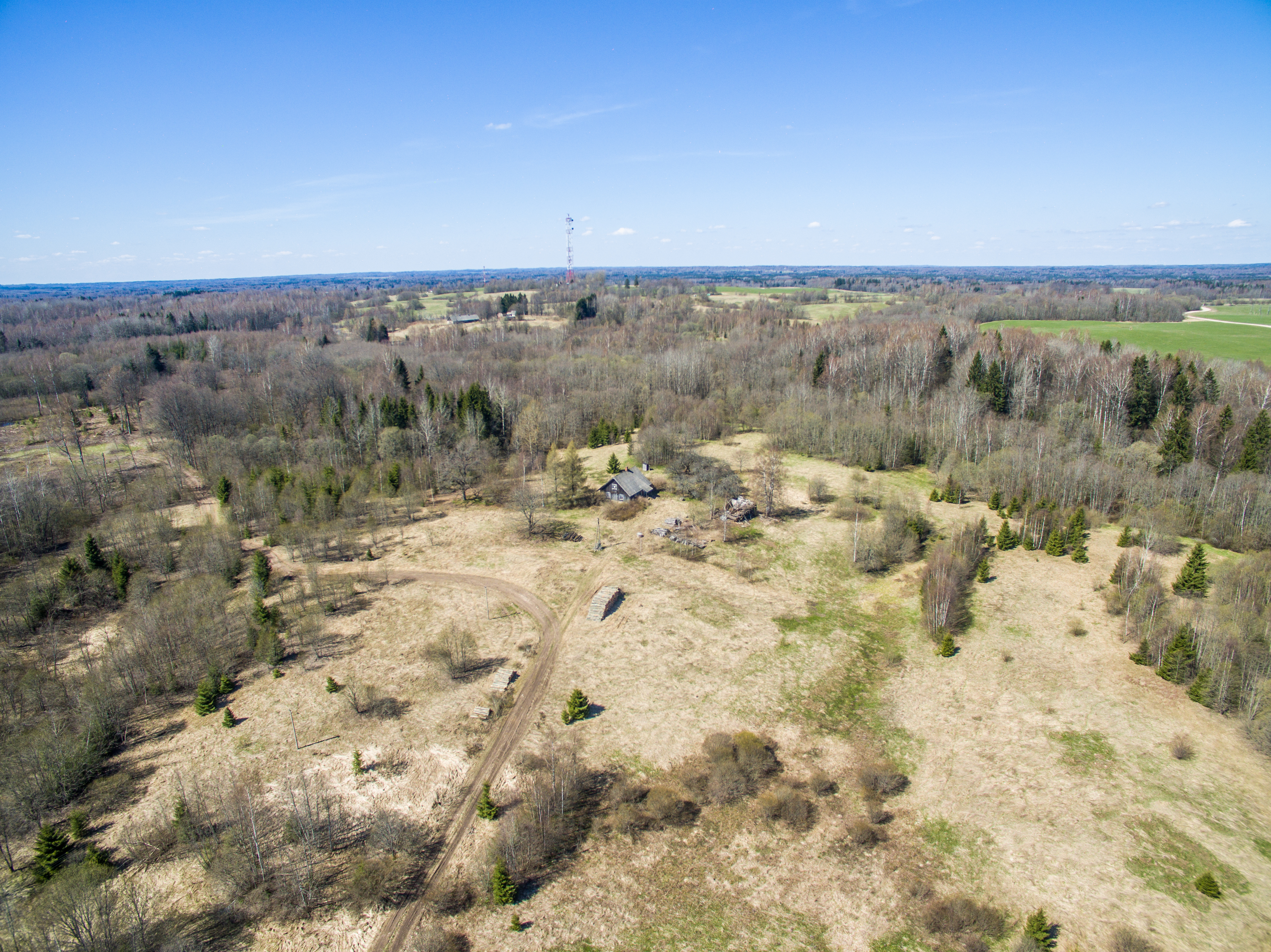 Kaive parish, LV-4144, Latvia